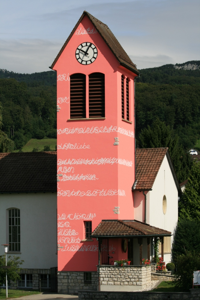 Reformierte Kirche Attiswil mit rosa Kirchturm